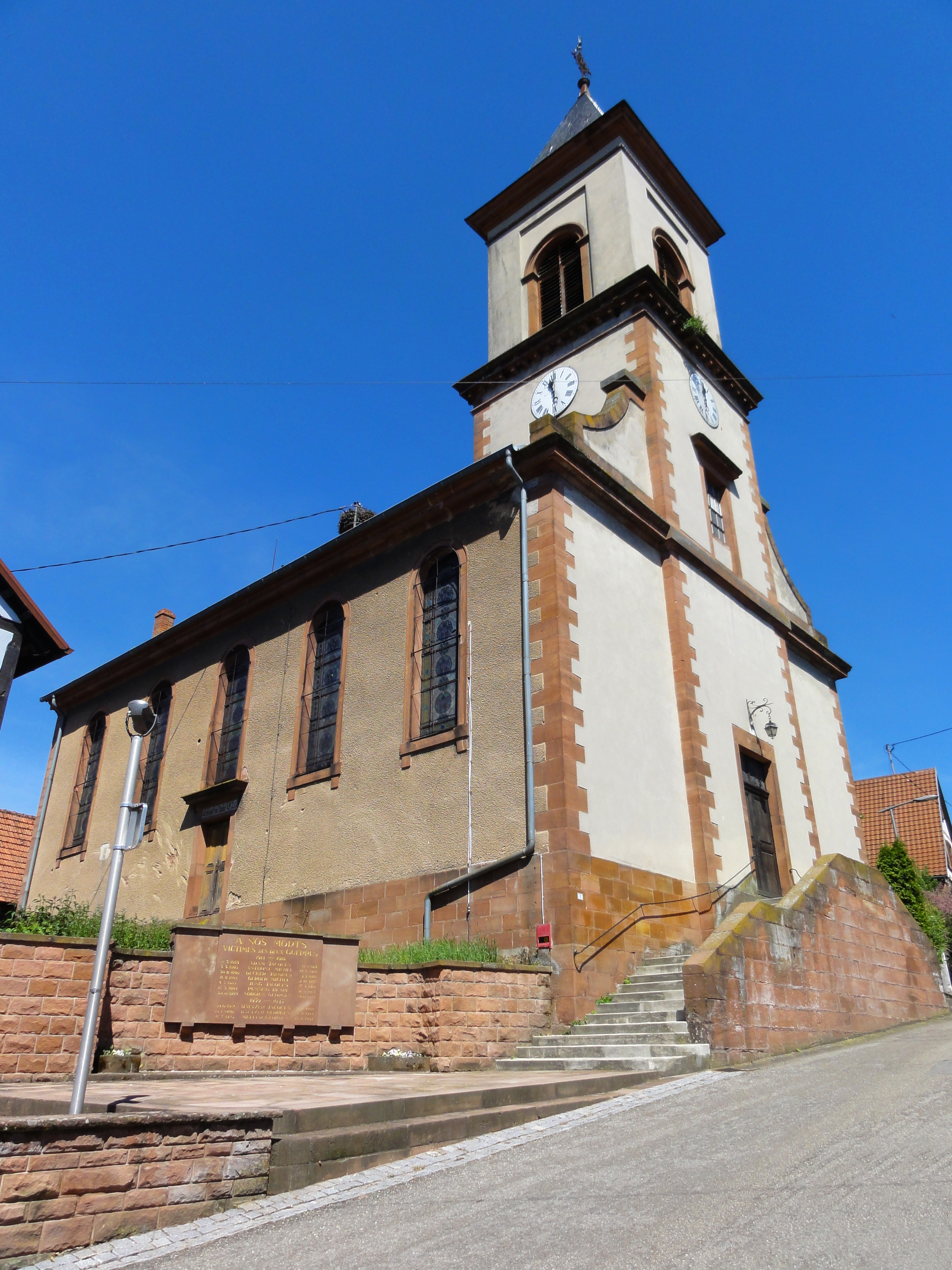 Alsace, Bas-Rhin, Niedersoultzbach, Église protestante (1826), rue de l'église. .